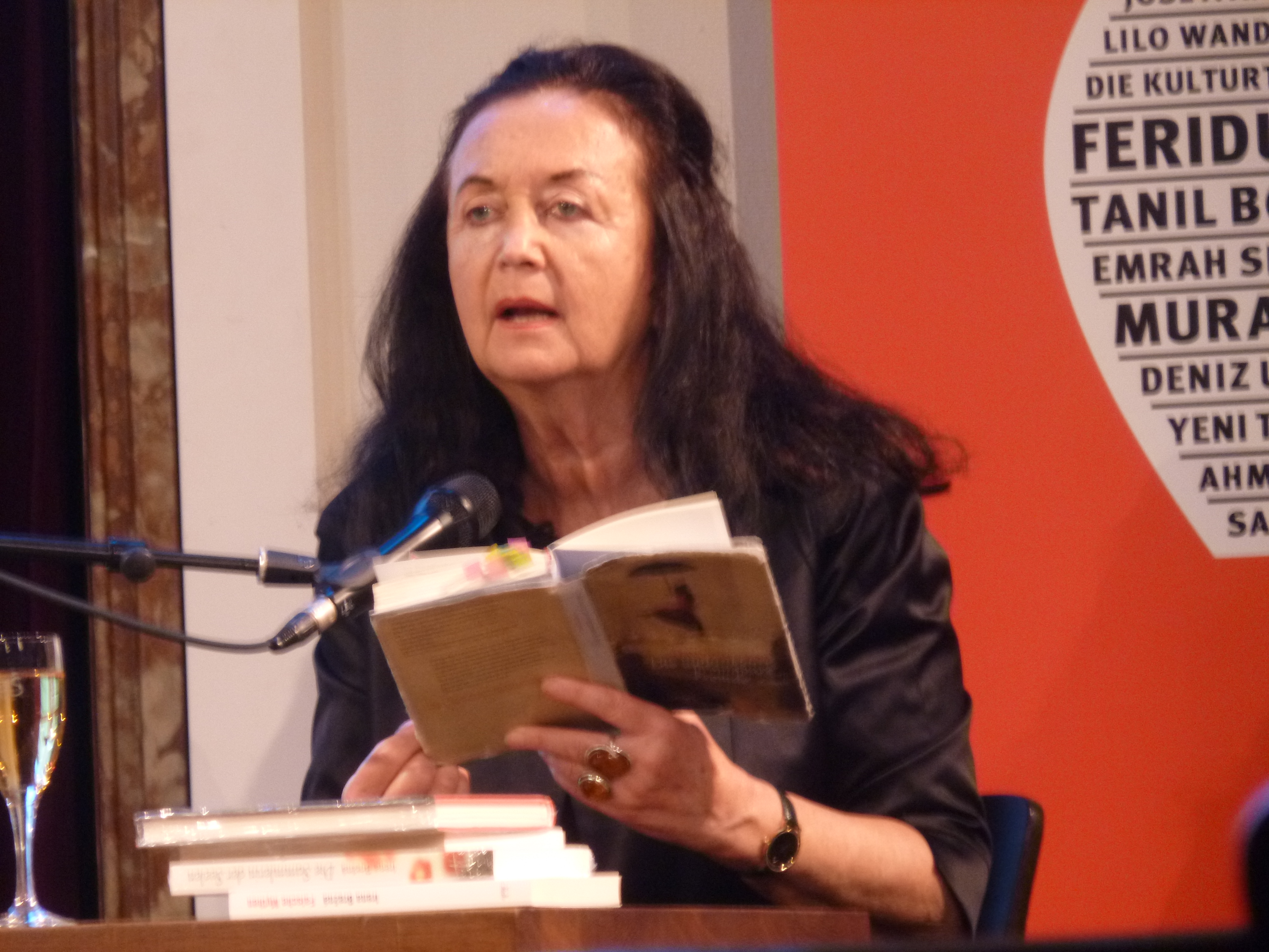 Irena Brežná. Lesung beim Literatuerk Festival 2014 im Grillo-Theater in Essen